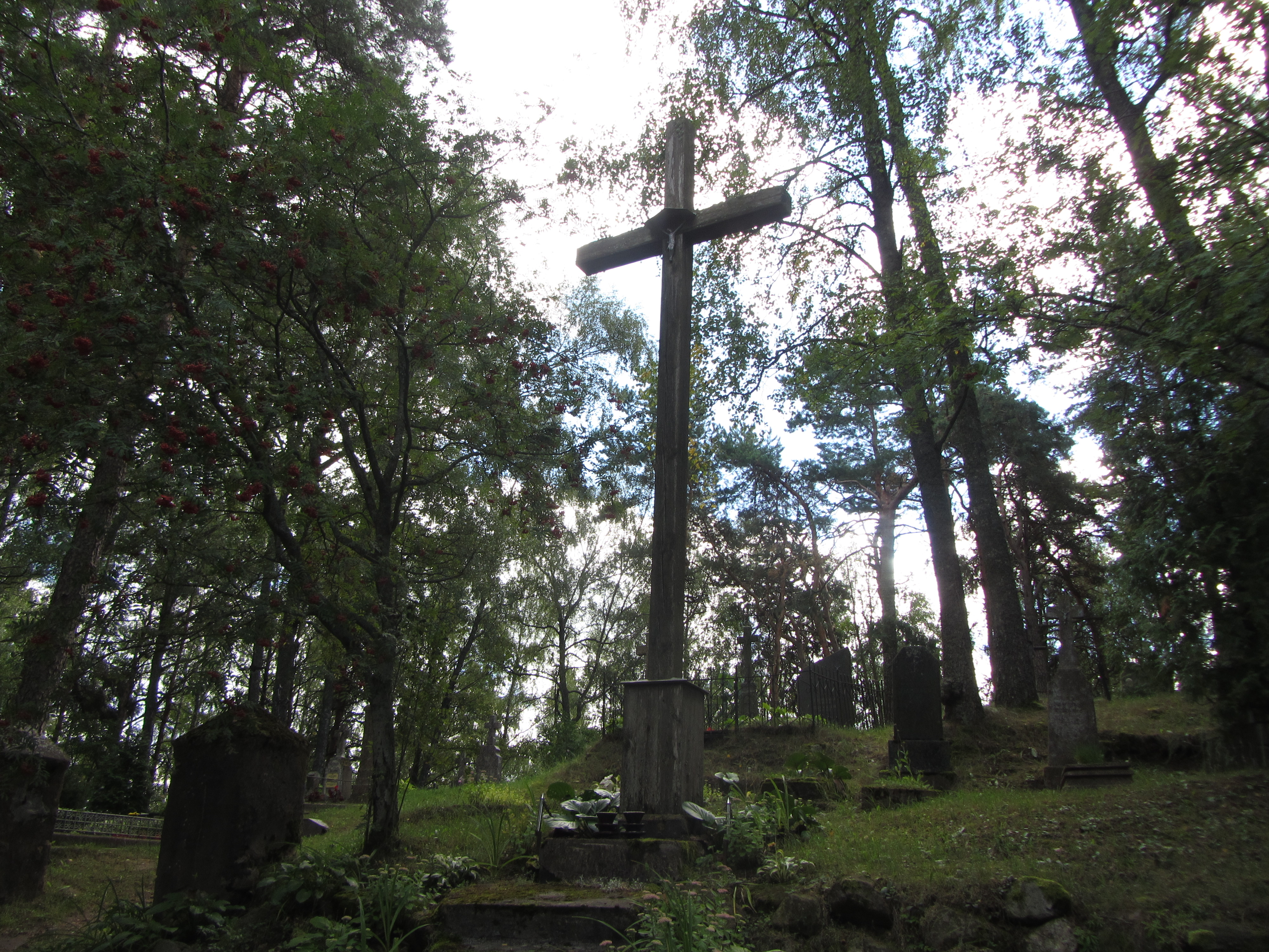 Dūkšto sen., Lithuania